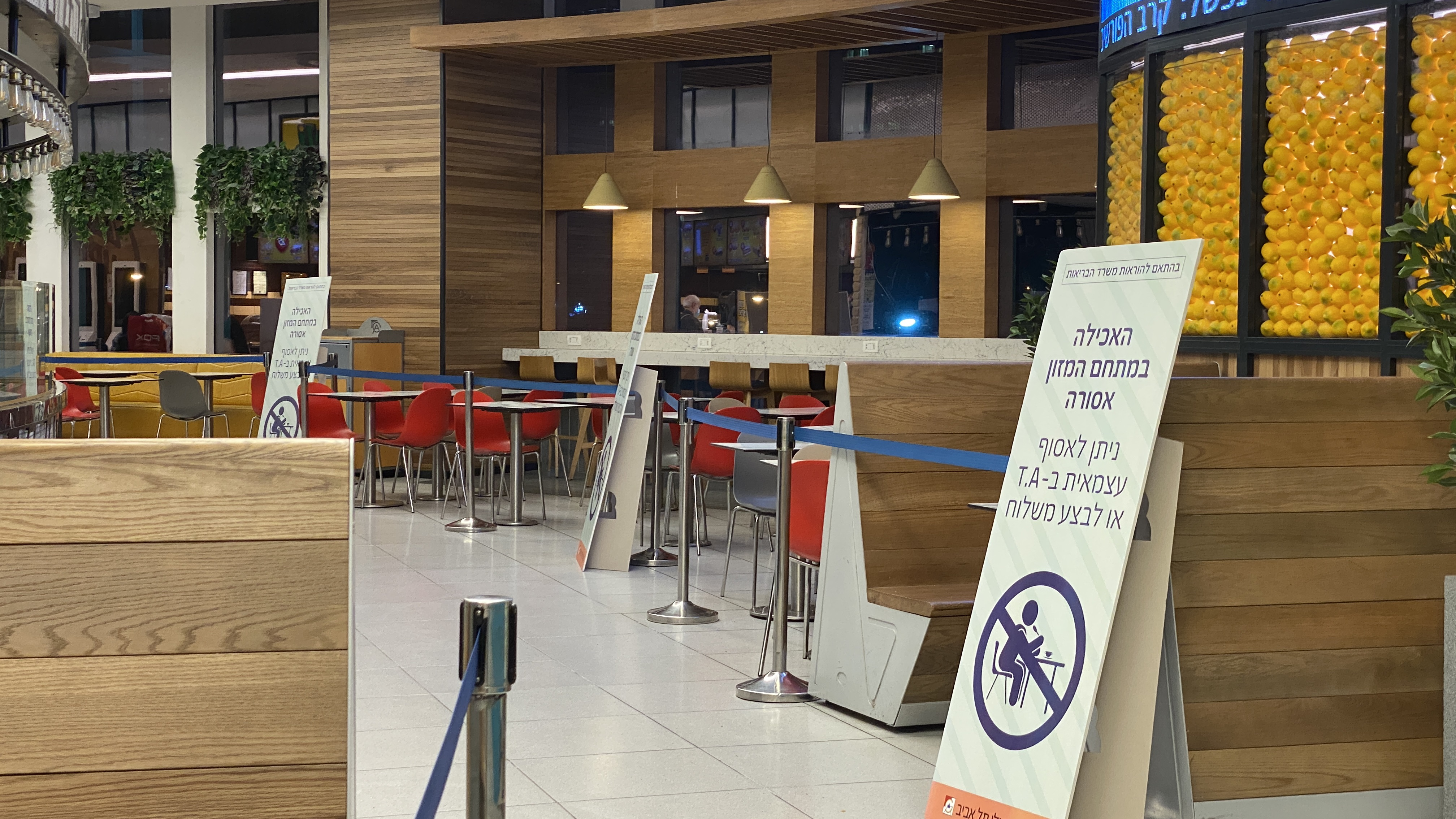 איזור המזון בקניון עזריאלי תל אביב בזמן מגפת הקורונה לאחר שהקניונים נפתחו מחדש